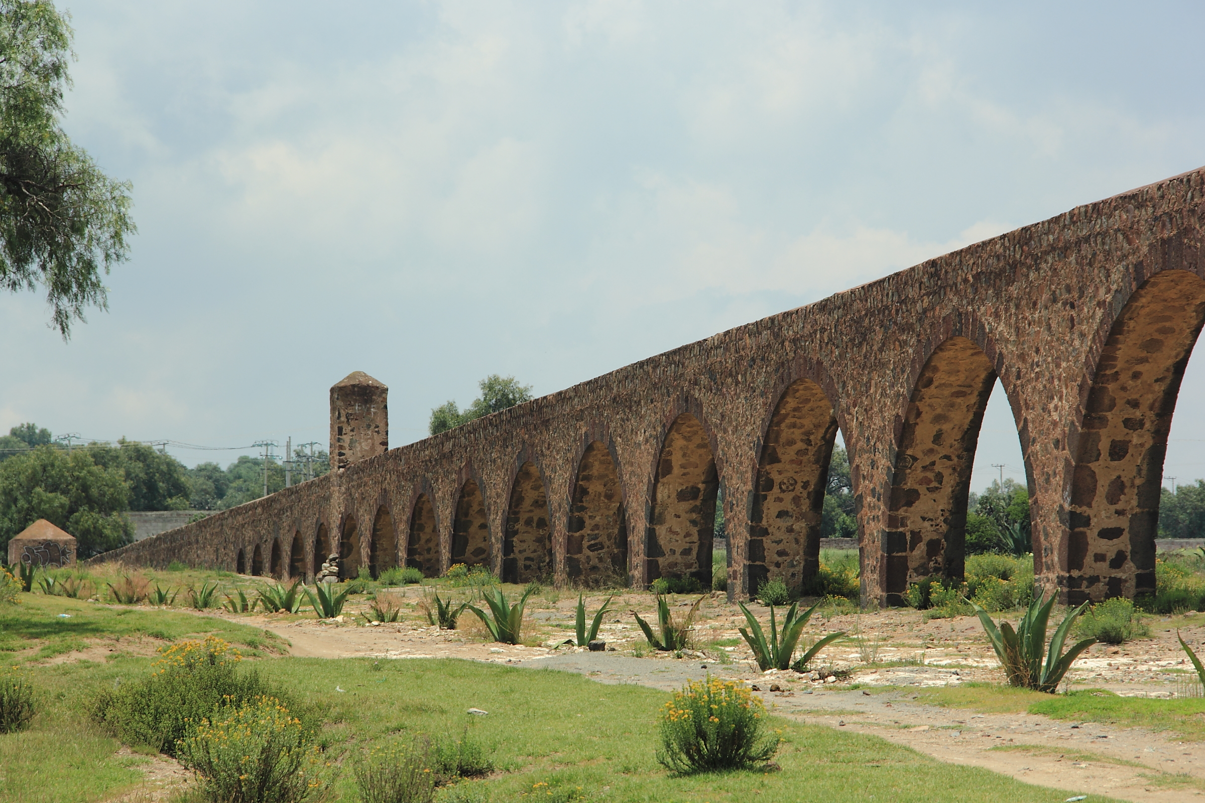 Vista de donde inicia uno de los lados del Acueducto del Padre Tembleque